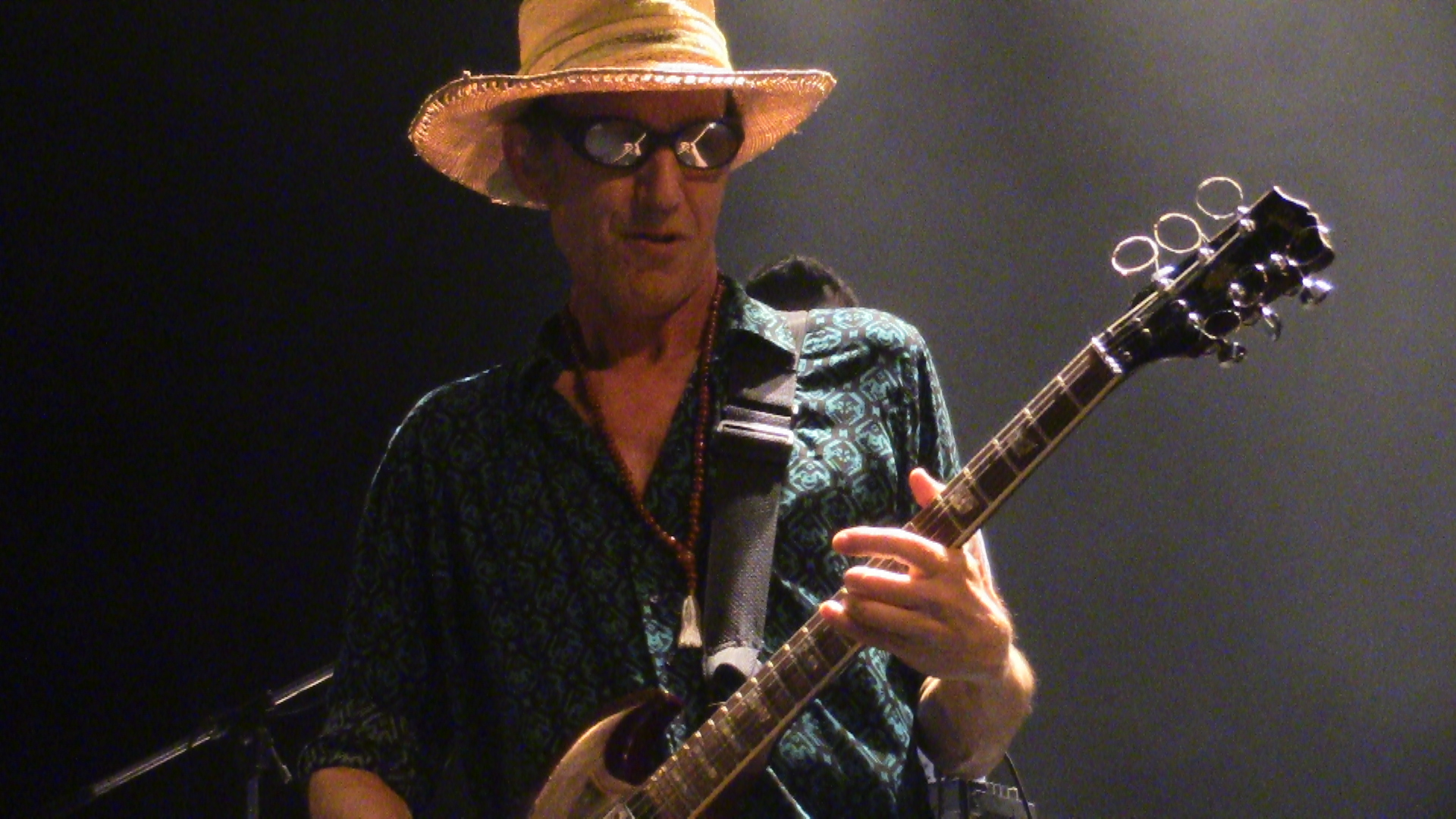 Eduardo "Skay" Beilinson, guitarrista argentino durante un show brindado en el año 2017.